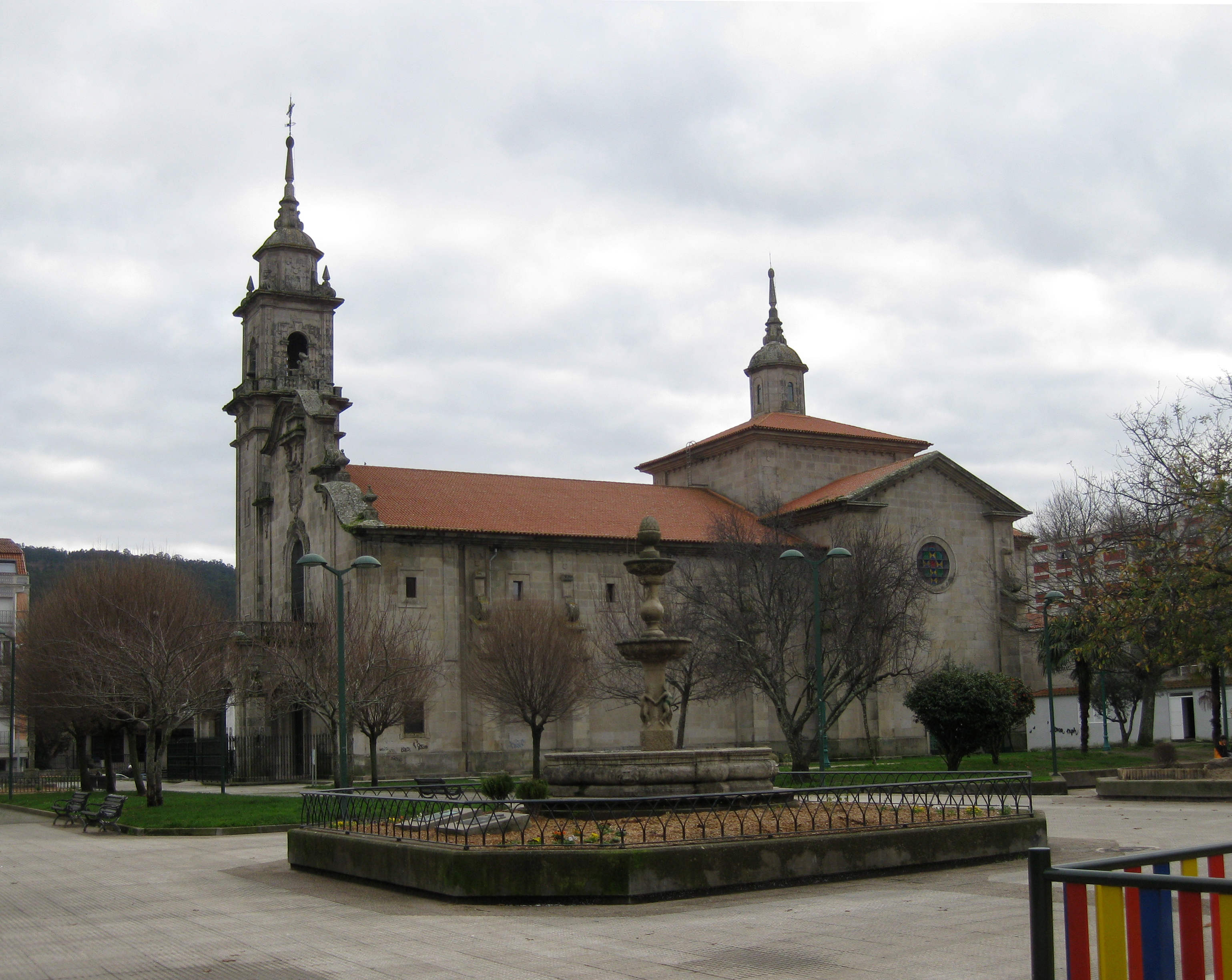 Igrexa de Santa María do Porto, Marín (Galiza).